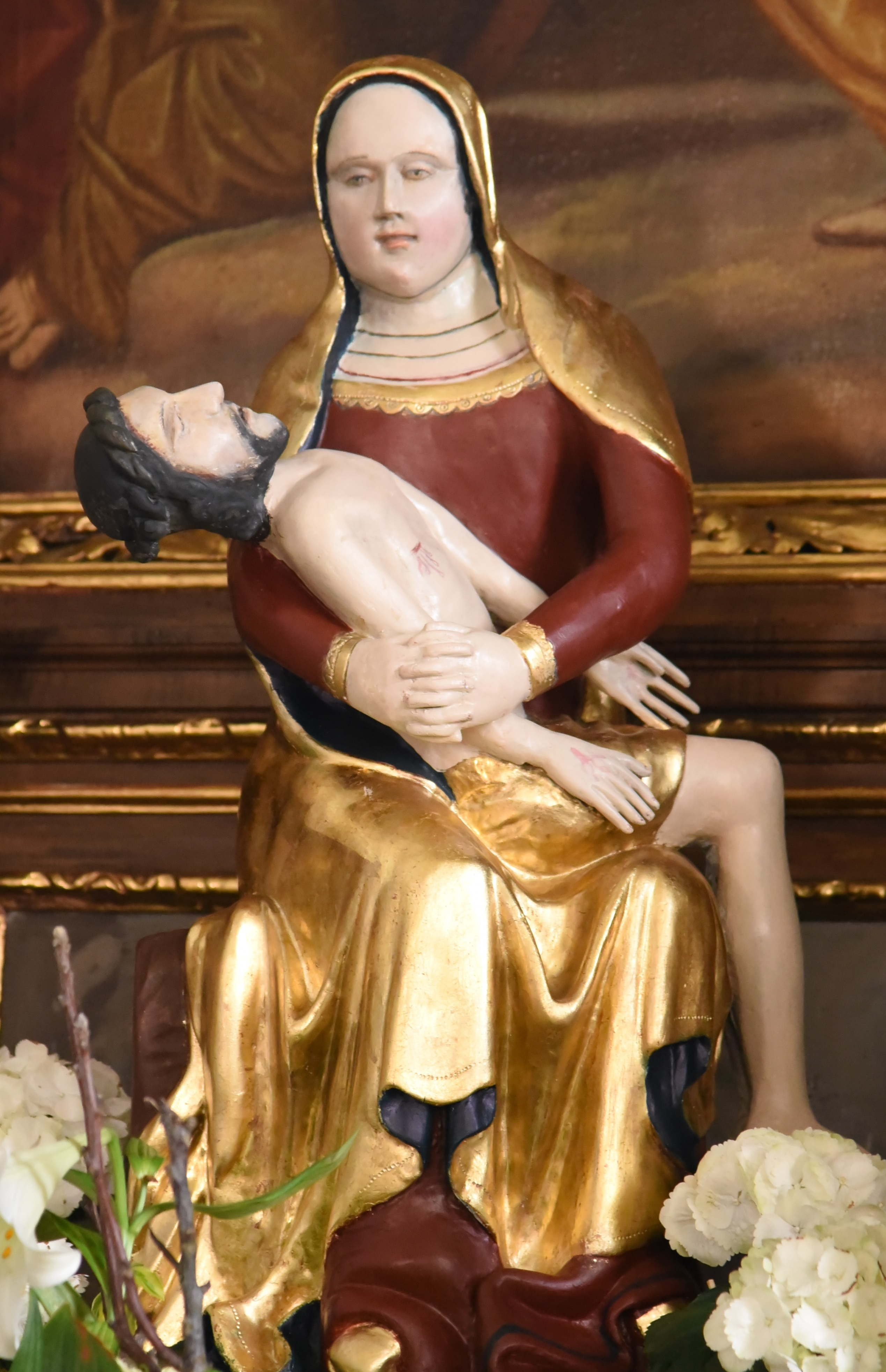 Spätgotische Pietà 1475 mit verschränkten Händen Hannberg, auch Hannberger Gnadenbild, jetzt in Kapelle in Hammberbach